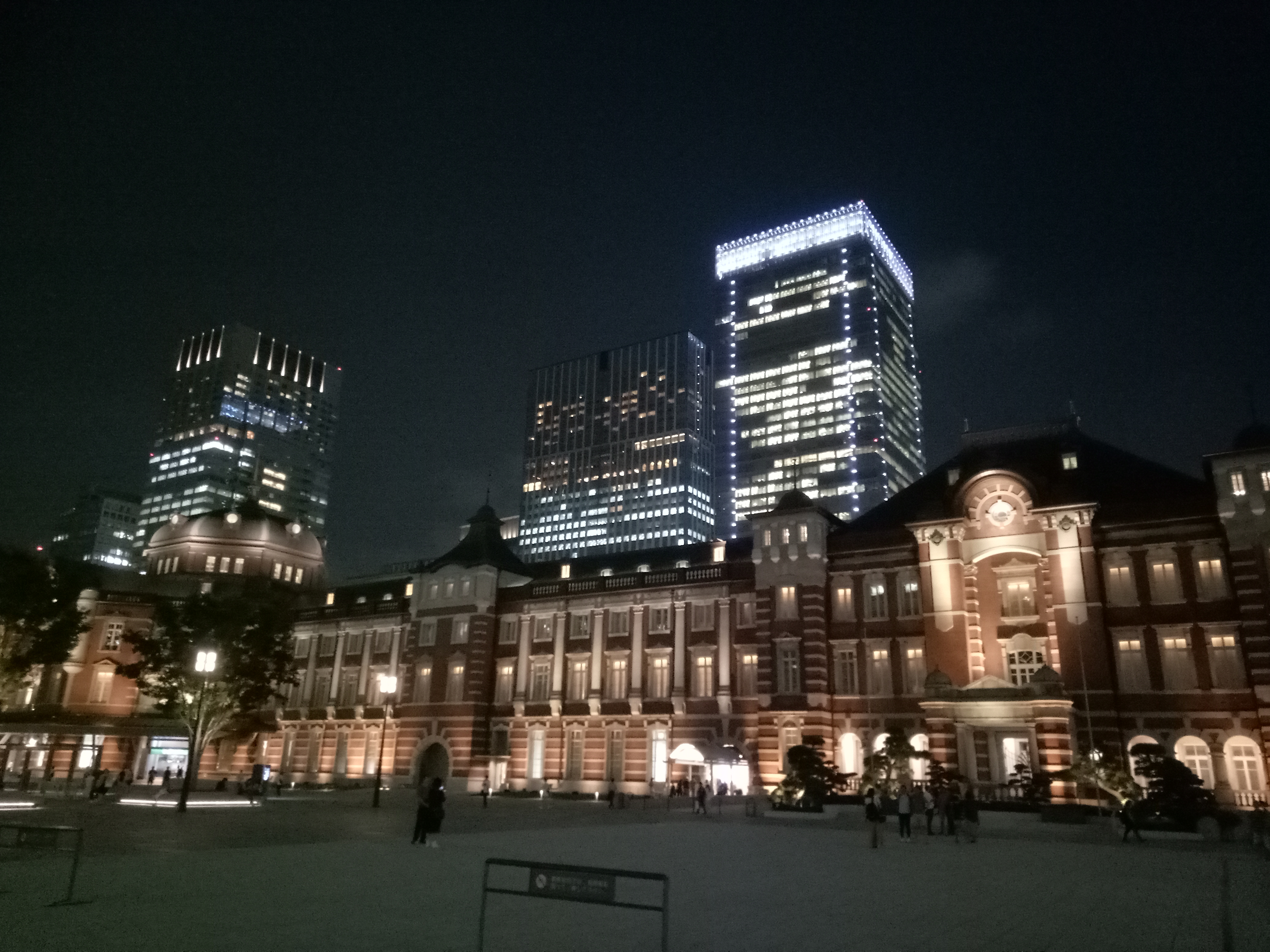 日本東京車站夜景。（2018年7月）